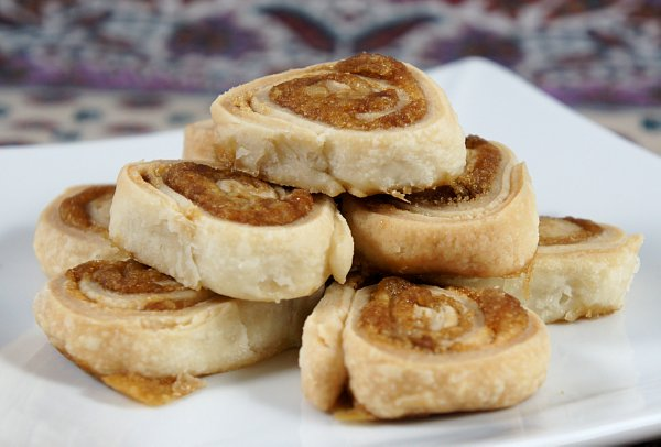 pet de sœur, pâtisserie traditionnelle québécoise.